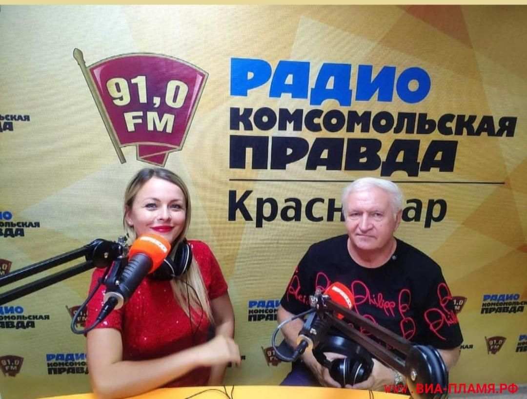 Юлия Ариничева и Вячеслав Синегубов (ВИА «ПЛАМЯ») на радио «Комсомольская правда». ВИА «Пламя» под руководством Юлии Ариничевой.